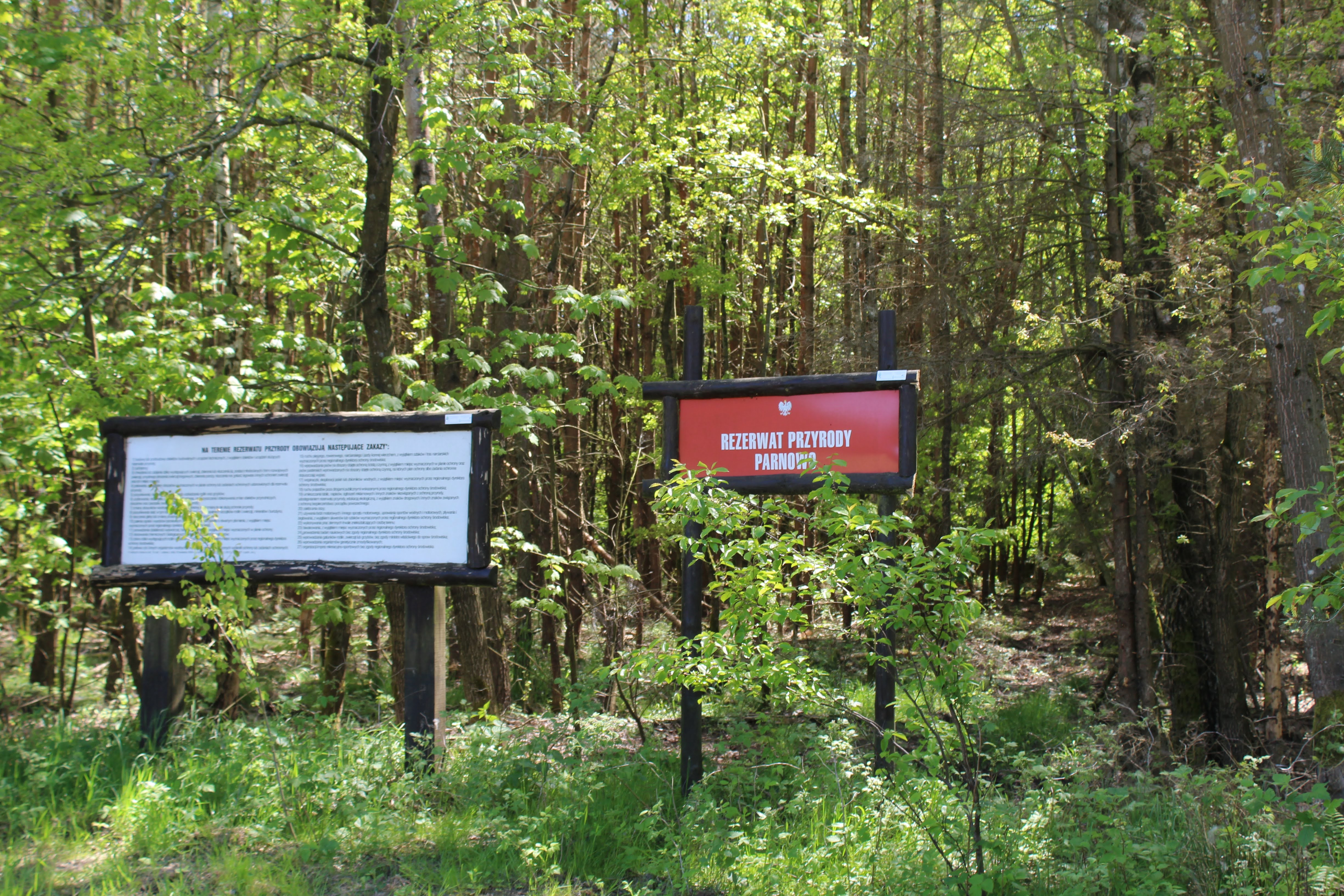 Rezerwat przyrody Parnowo